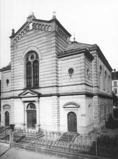 Synagogue in Constance (Germany) destroyed in 1938 during the Crystal Night (November Pogrom), see: Franz-Josef Ziwes (Hrsg.): Badische Synagogen aus der Zeit von Großherzog Friedrich I. in zeitgenössischen Photographien. G. Braun, Karlsruhe 1997, ISBN 3-7650-8177-9, S. 34–35